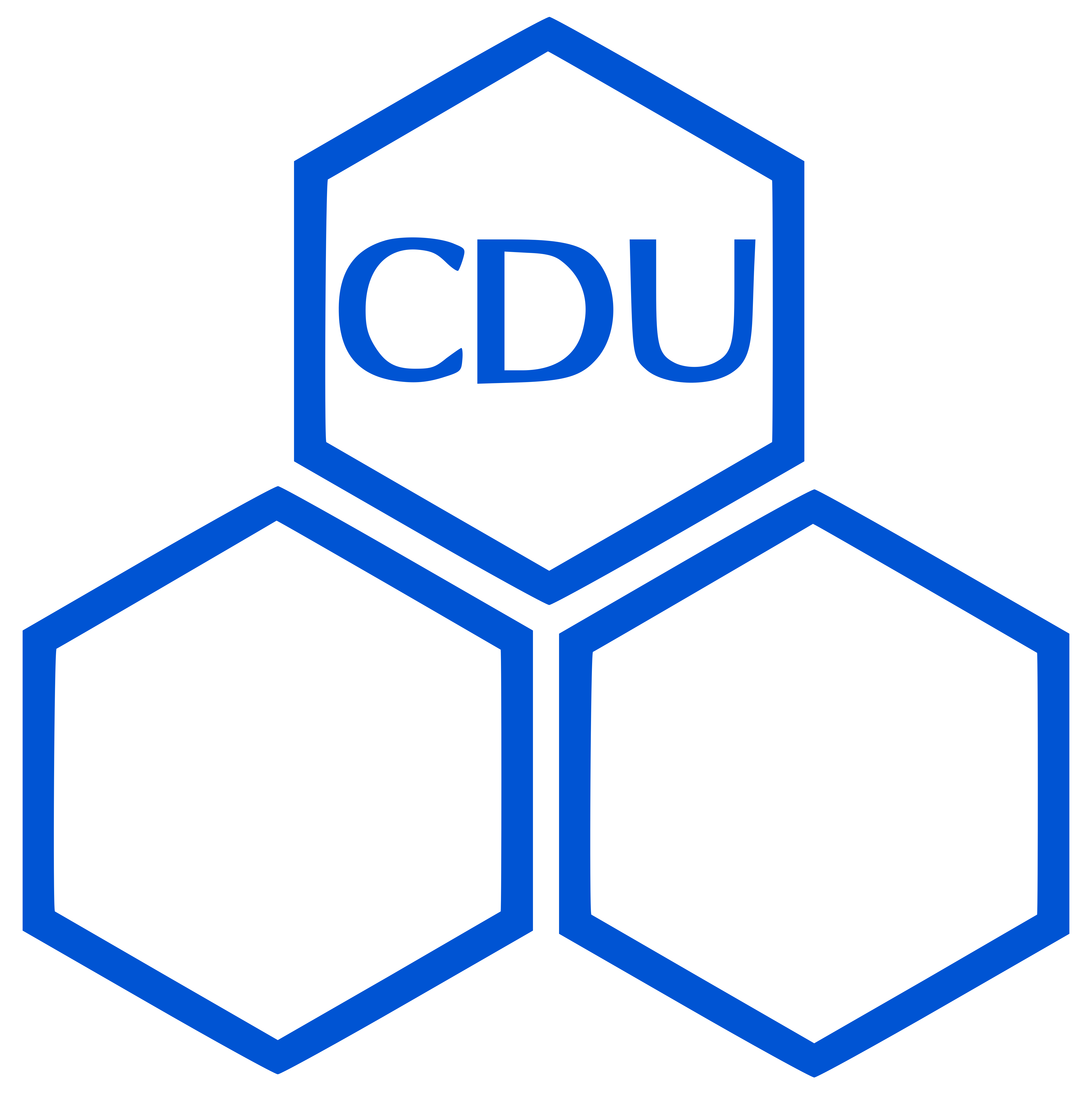 Emblema de Coligação Democrática Unitária